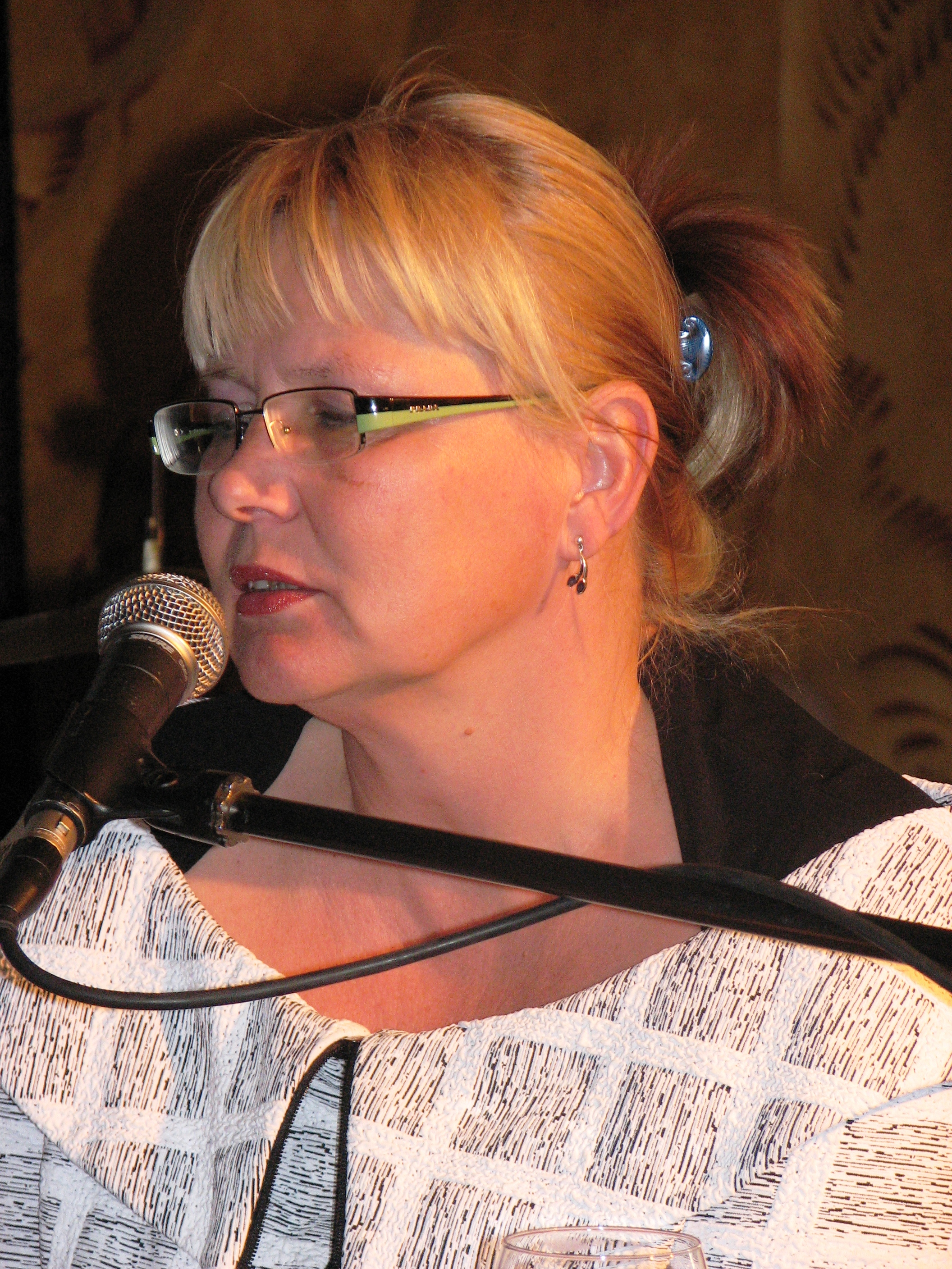 Aet Maatee on eesti kultuuritegelane.